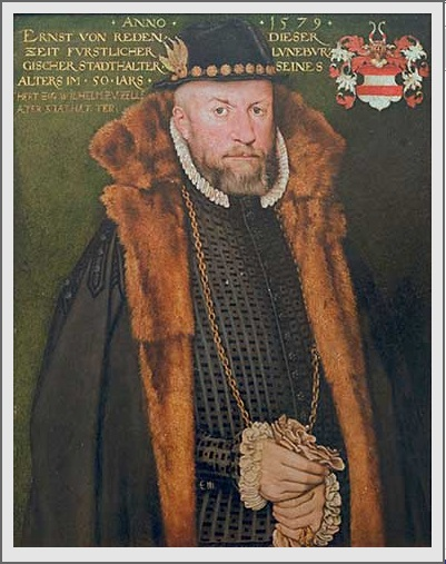 Ernst von Reden (* ca. 1529; † 29. März 1589), governor of Celle